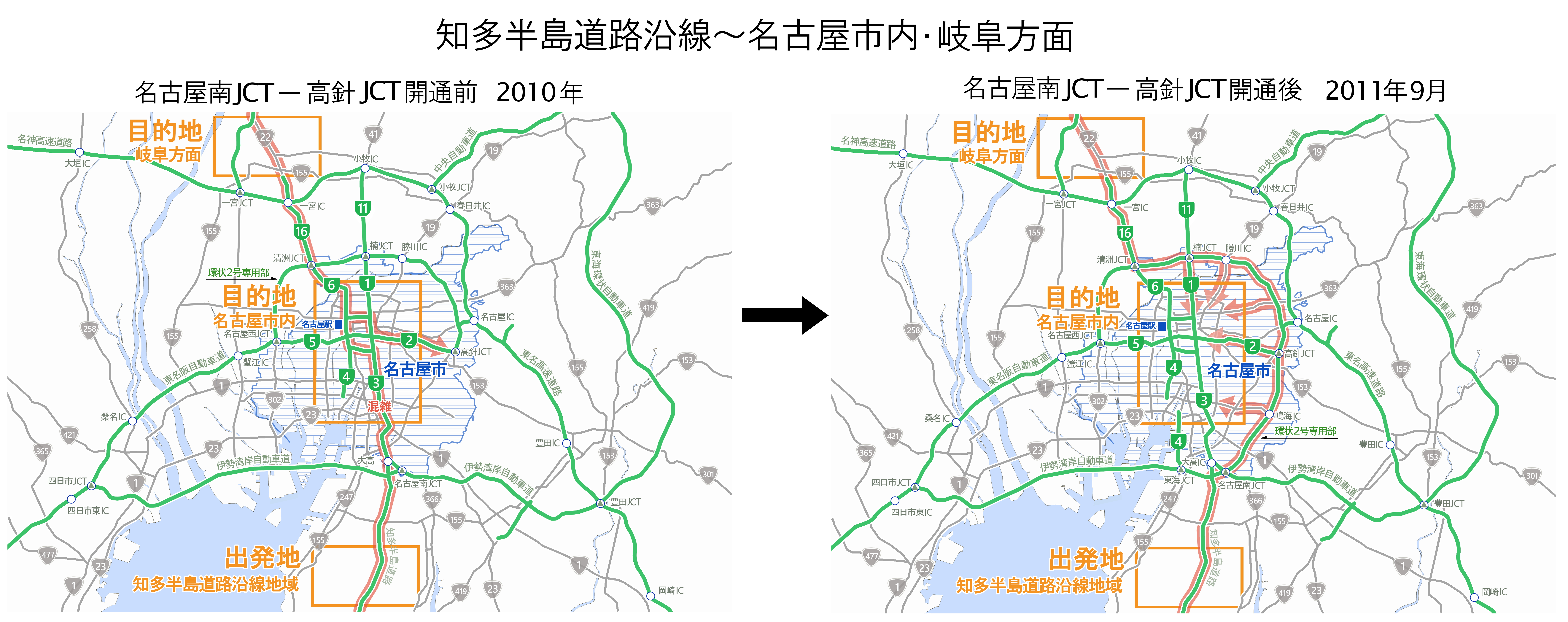 名古屋環状2号線専用部、名古屋南JCT-高針JCT間開通に伴う影響分析。図典拠：『高速道路と自動車』第55巻第6号、2012年6月、43-46頁